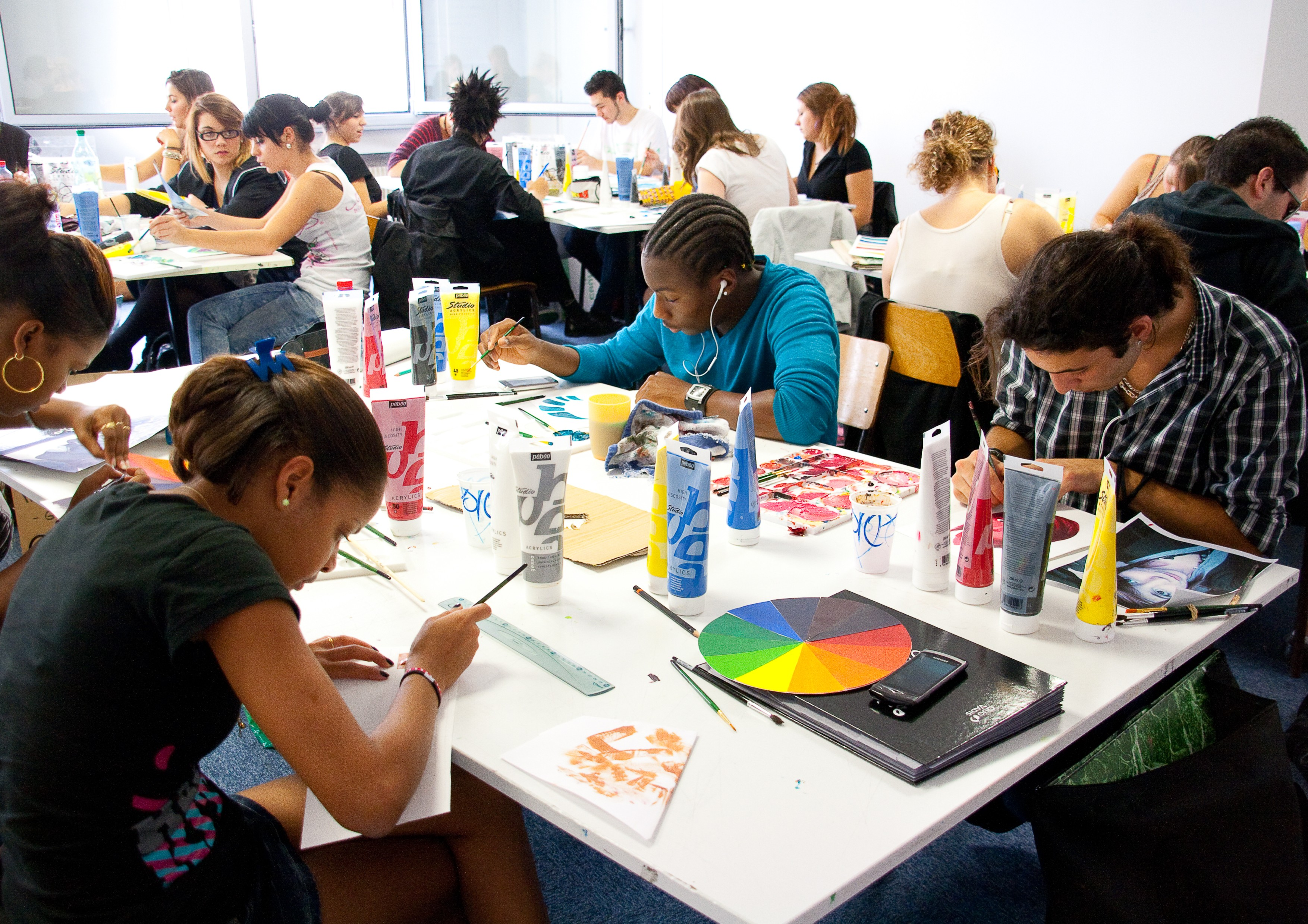 Etudiants de Mise à niveau en arts appliqués, Bellecour Ecole